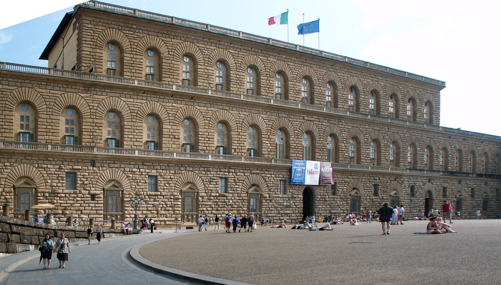 Palais Pitti, Florence